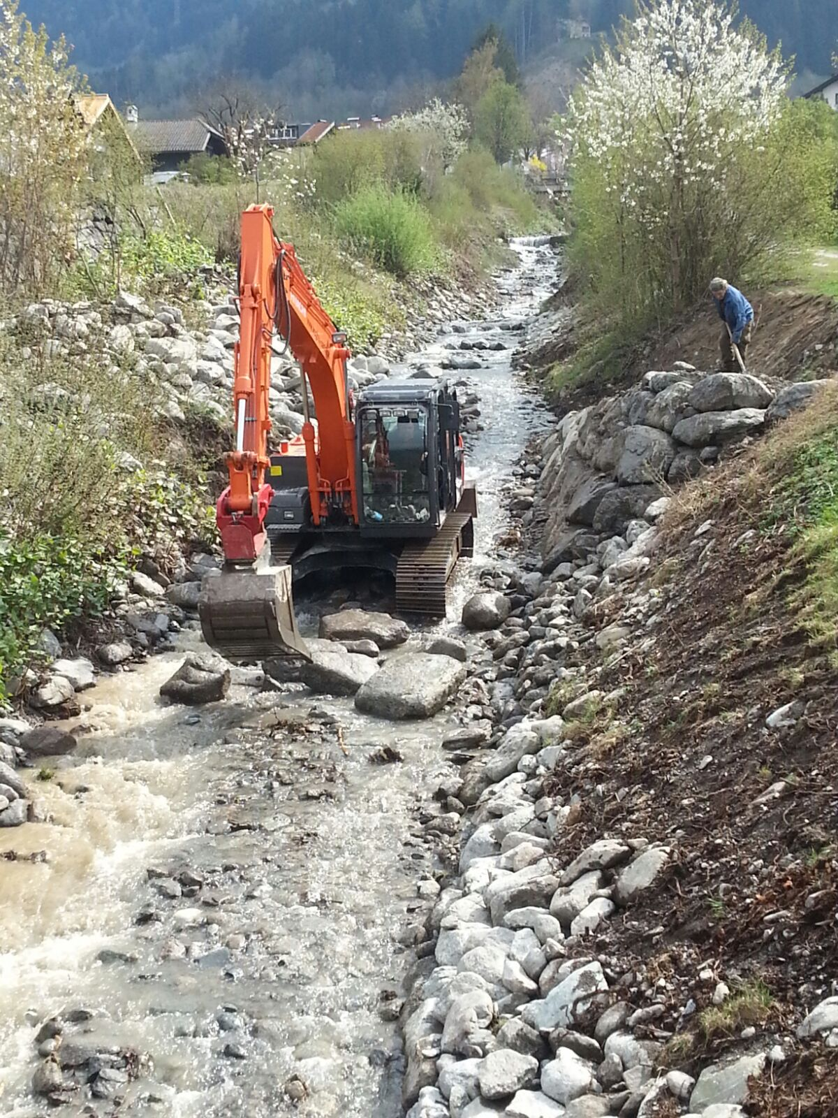 Lahnbachverbauung und -sanierung 2017